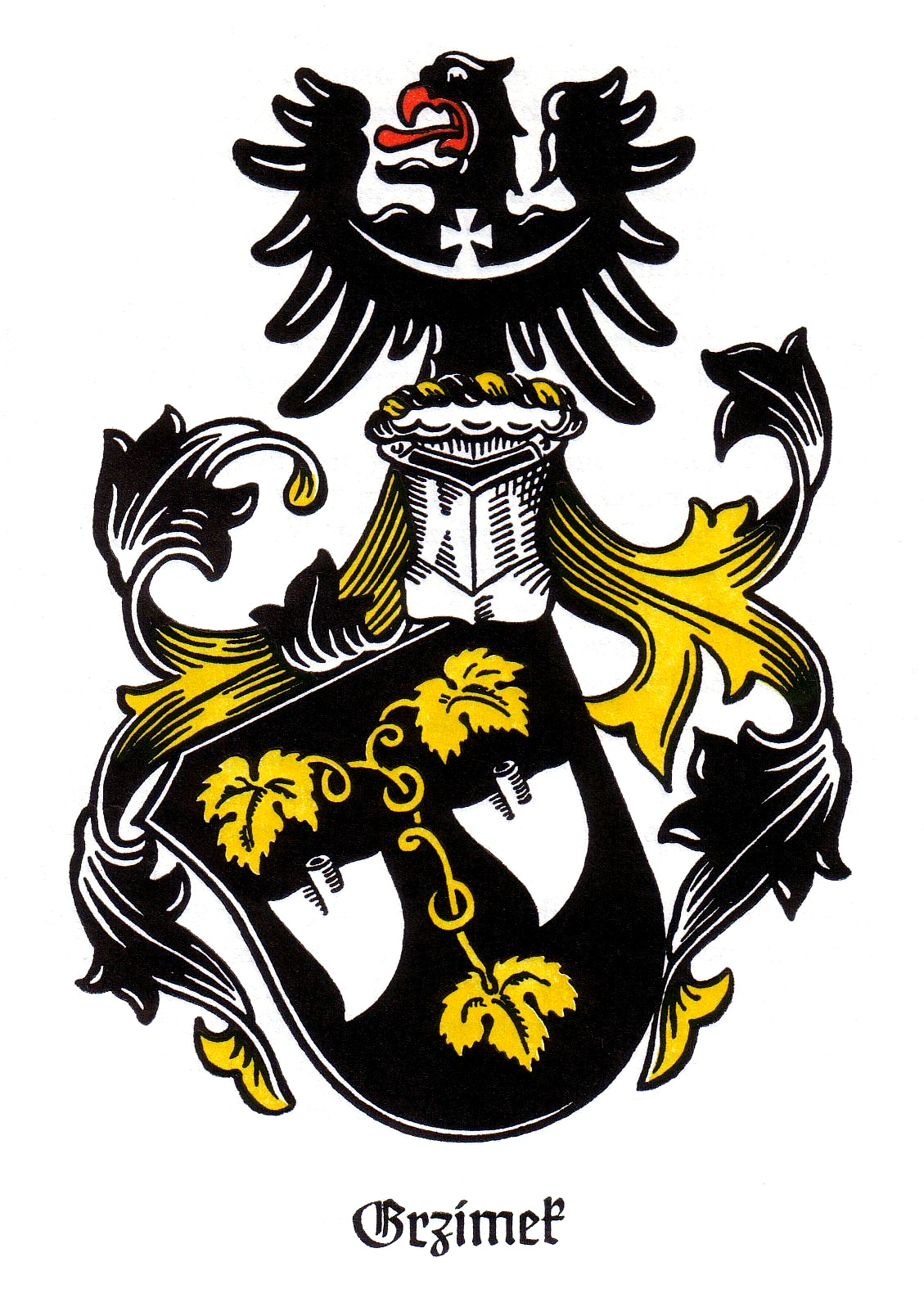 Das Wappen der Familie Grzimek